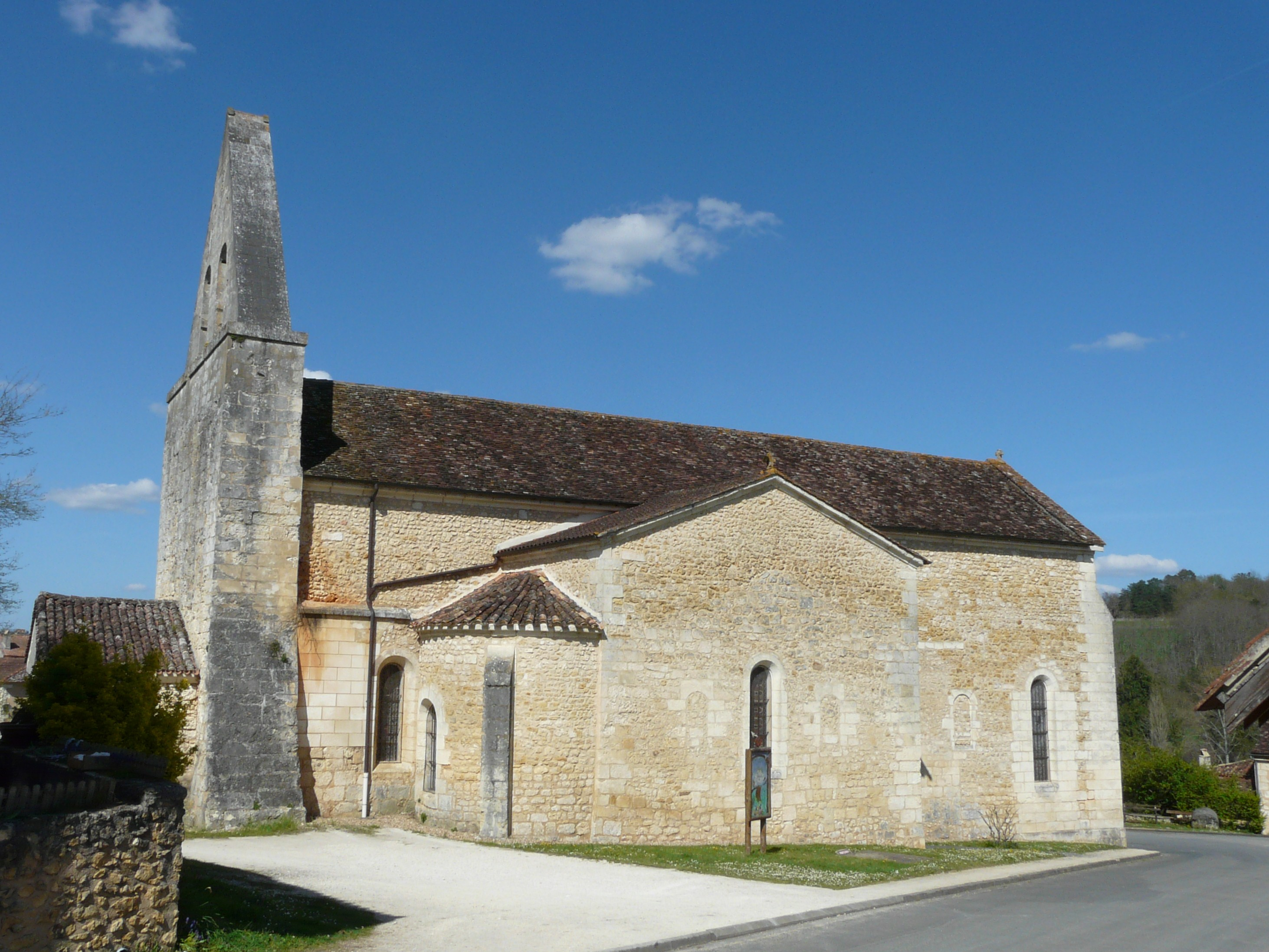 L'église Saint-Martin, Montagnac-la-Crempse, Dordogne, France.